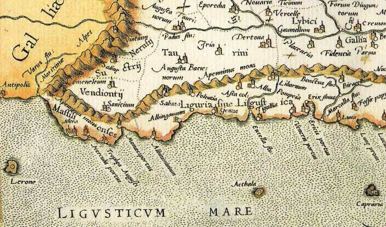 A l'extrême ouest, le fleuve Var représentant la frontière naturelle de la région ligure sur une carte de G. Mercator en 1576 inspirée depuis Pline l'Ancien (a.c 23 - 79 a.c) et une carte de Claudius Ptolémée (76 a.c - 158 a.c).